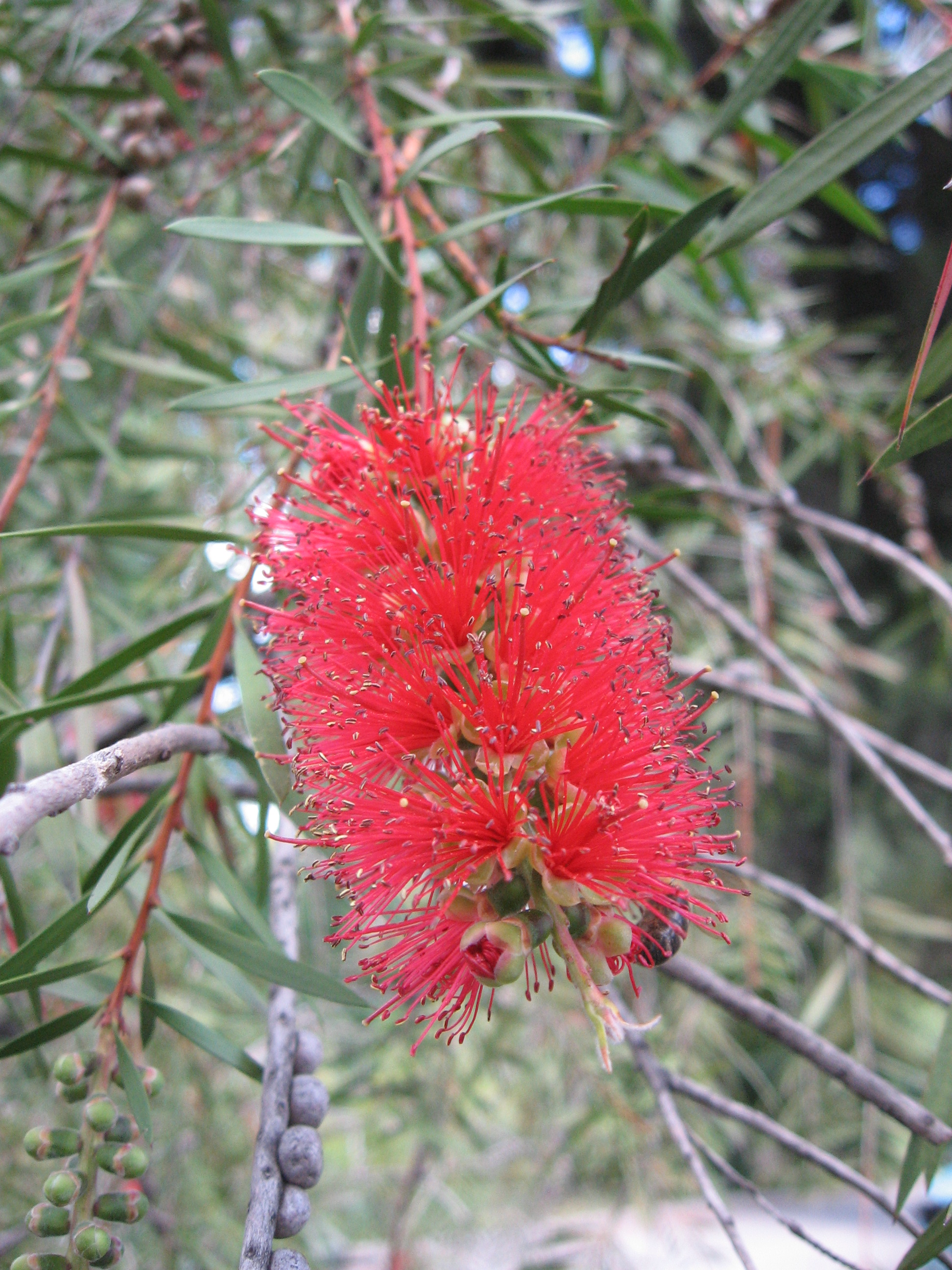 Callistemon pungens. Real Jardín Botánico de Madrid.